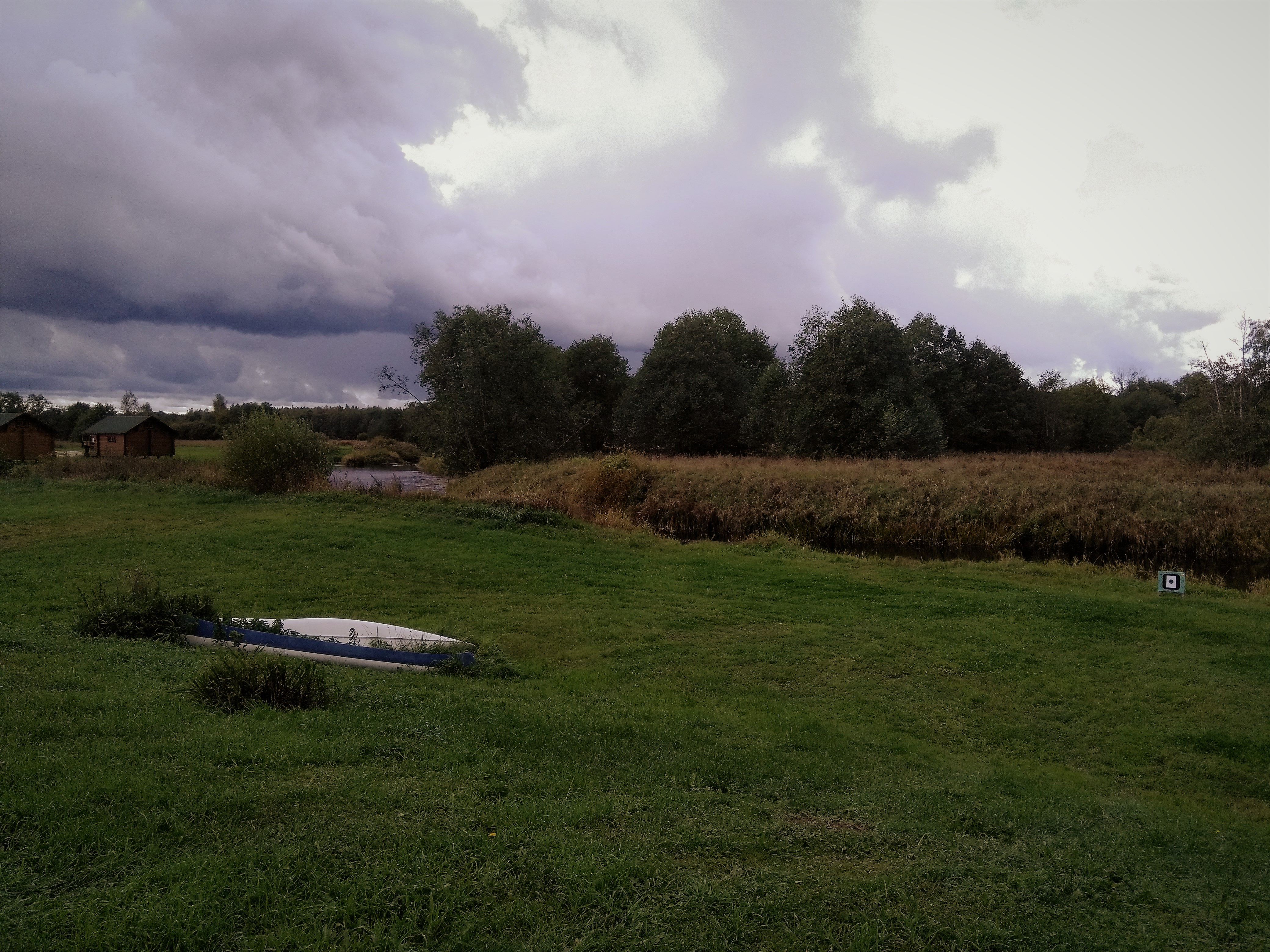 Vaade kirde suunalt Halliste jõe keskjooksule Iia külas. Paik on suurvee poolt üleujutatav ja jääb Soomaa Rahvuspargi alale.